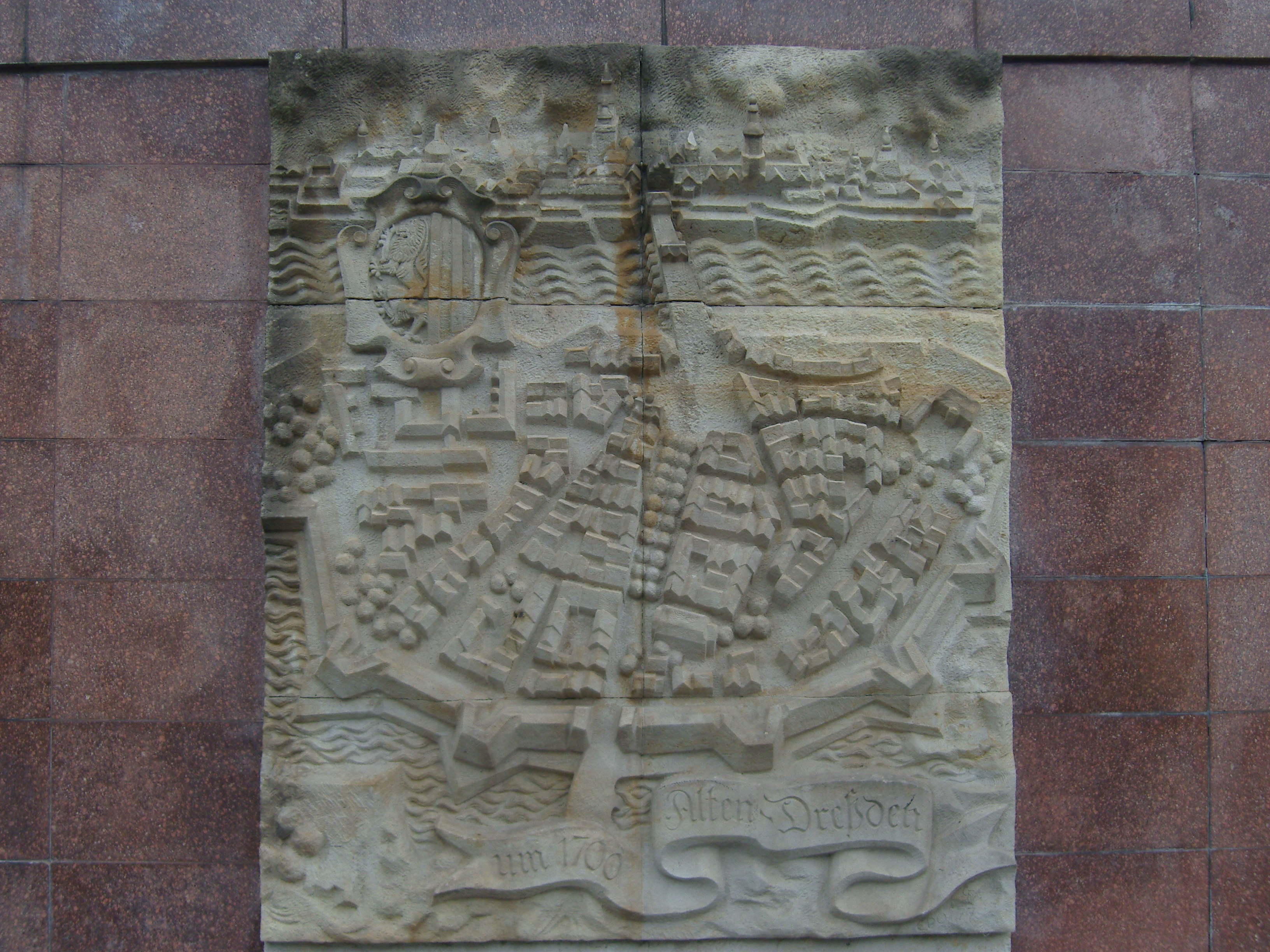 Relief von Vinzenz Wanitschke in Dresden am Fussgängertunnel zum Neustädter Markt geschaffen 1979